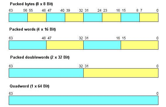 Four Datatypes in MMX